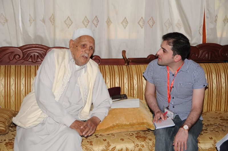 مع محمد عمر المختار نجل المجاهد الليبي عمر المختار في بنغازي